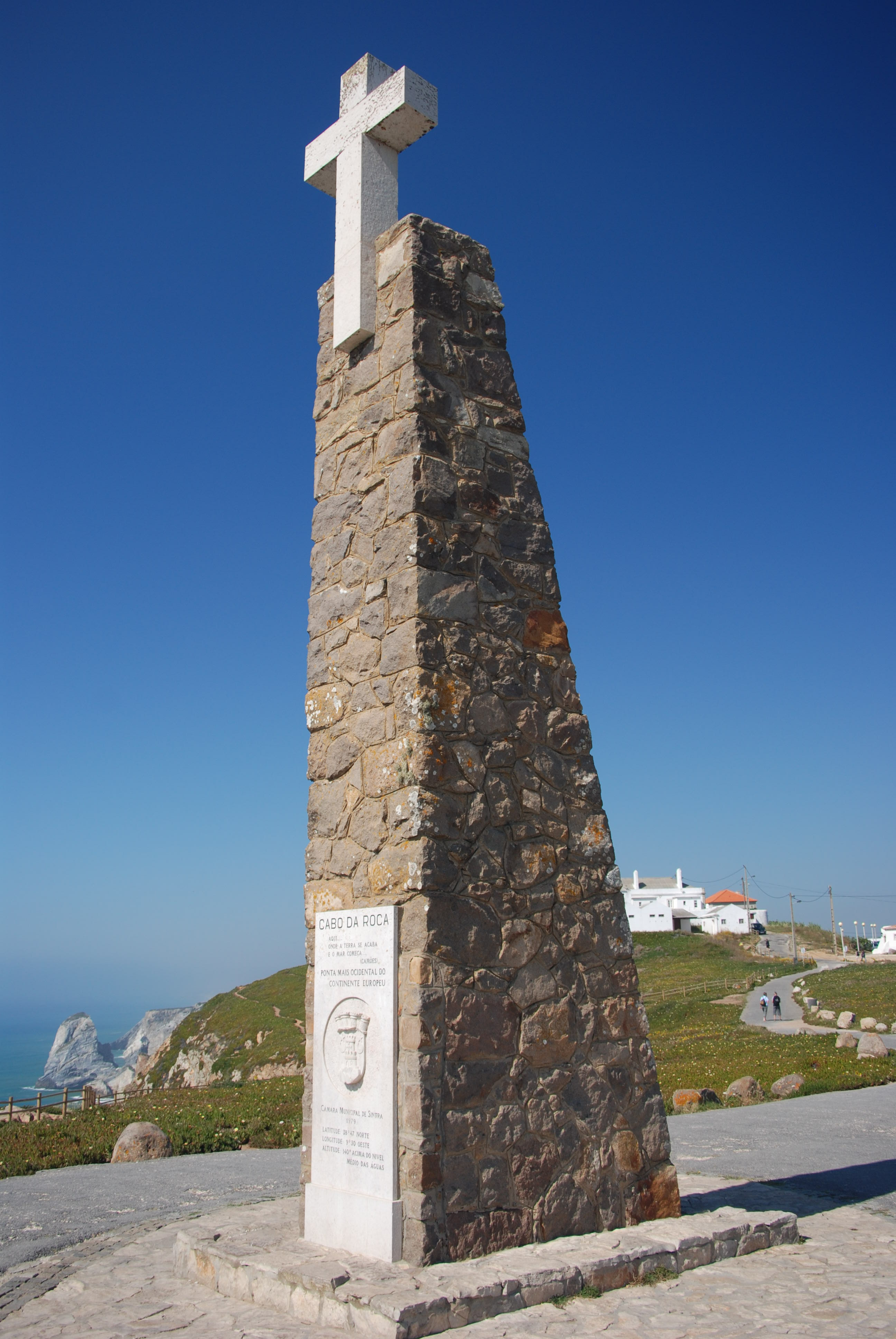 Cross at Cabo da Roca - Portugal